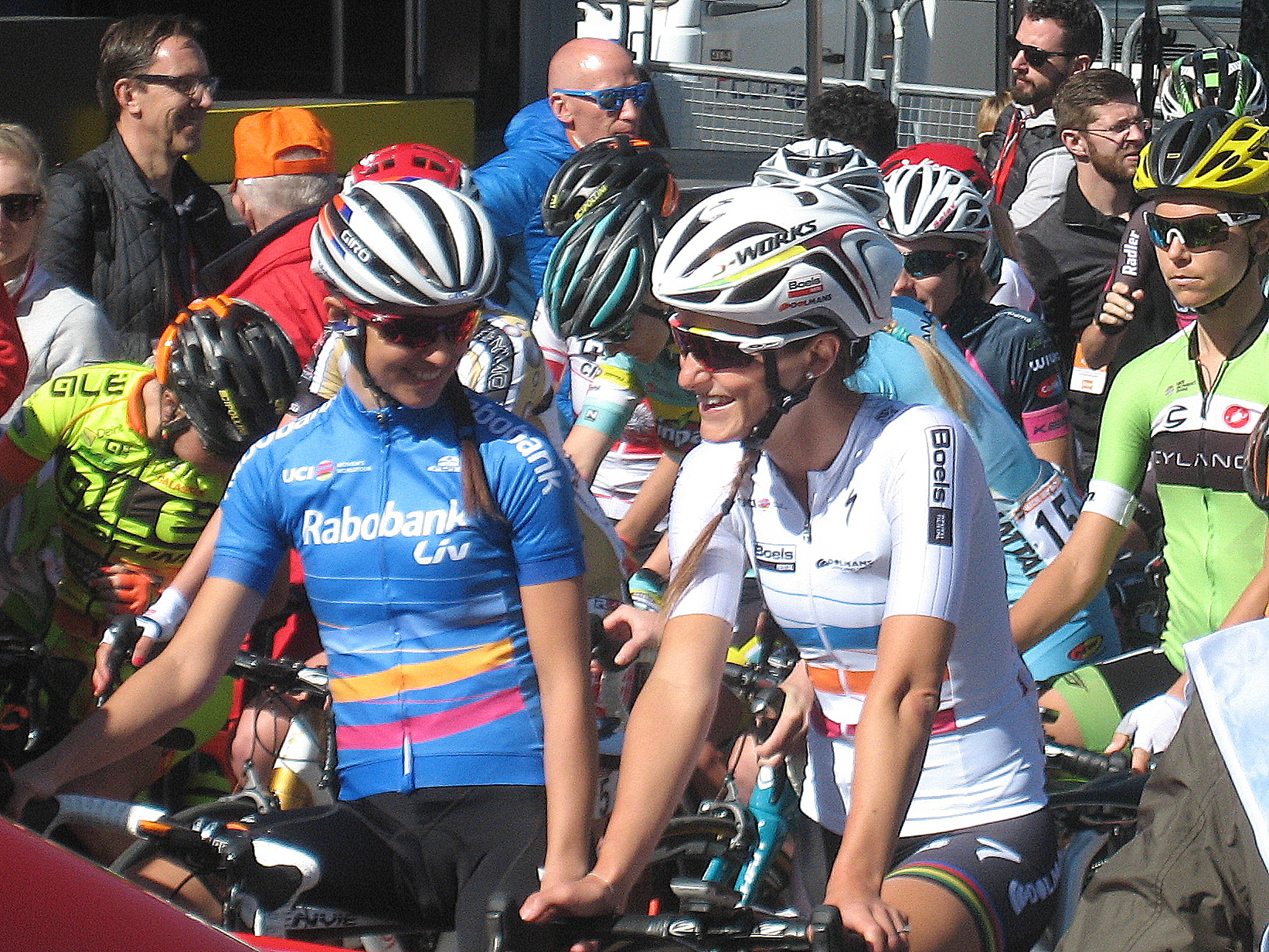 World Tour-leiders Niewiadoma en Armitstead aan start Waalse Pijl 2016